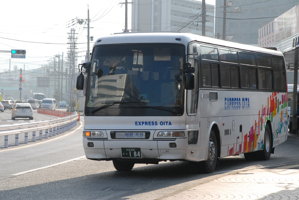 大分バス 砂津にて撮影